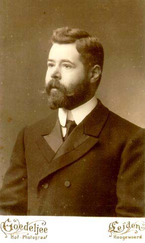 Gerrit Jacob Boekenoogen (1868-1930). Foto waarschijnlijk door Jan Goedeljee (d. 1905)